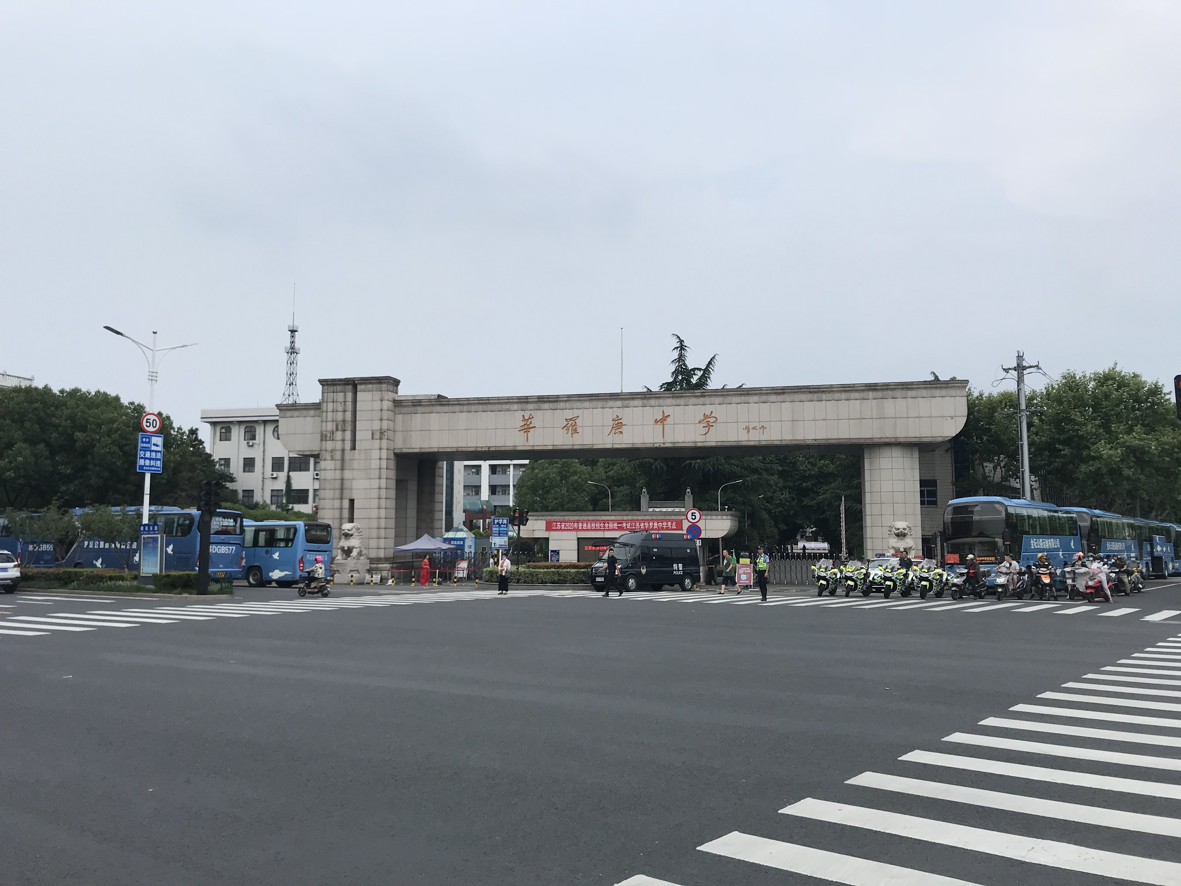 2020年普通高校招生全国统一考试江苏省华罗庚中学考点。时值数学科。